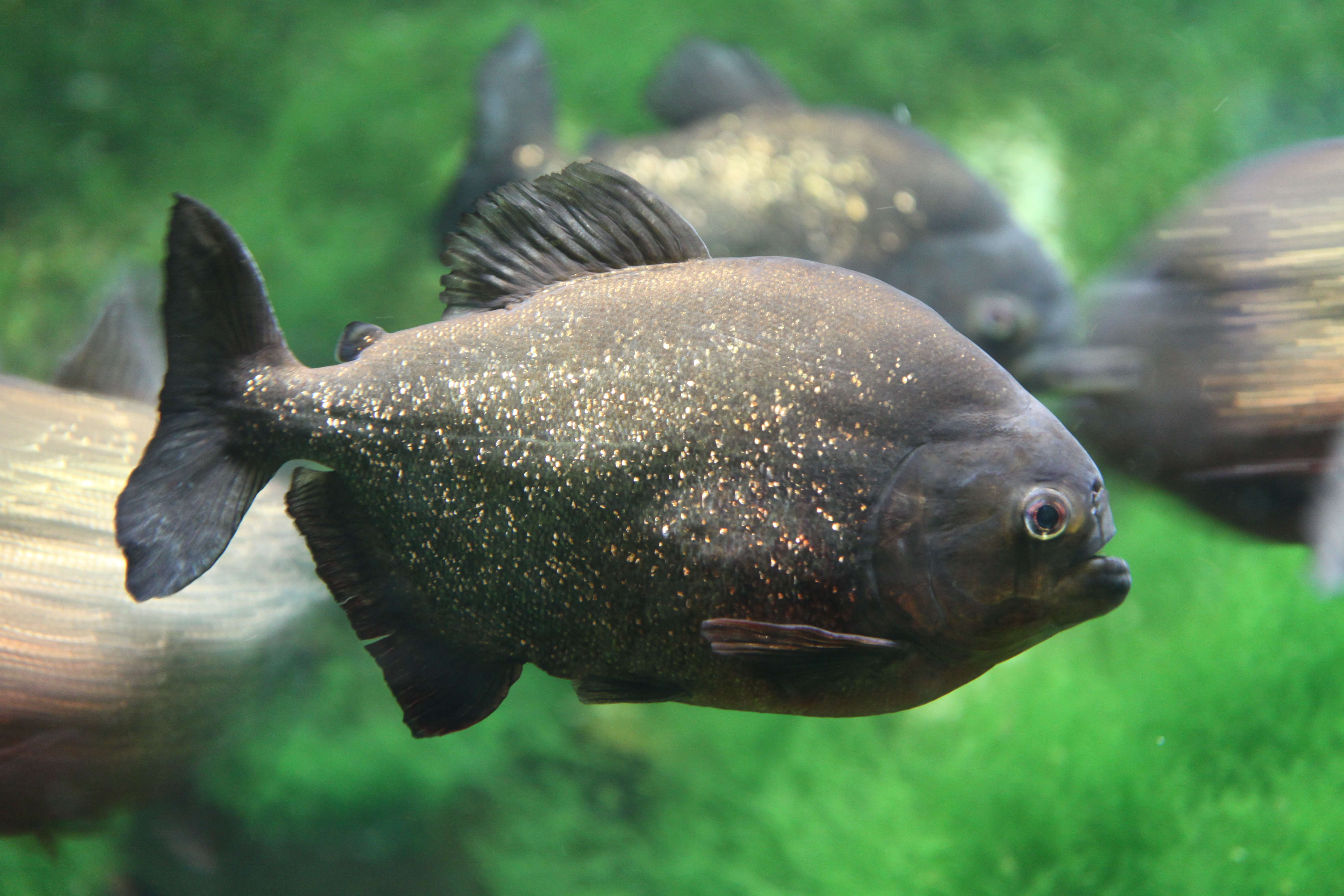 Piranha rouge à l'aquarium de la porte dorée à Paris.